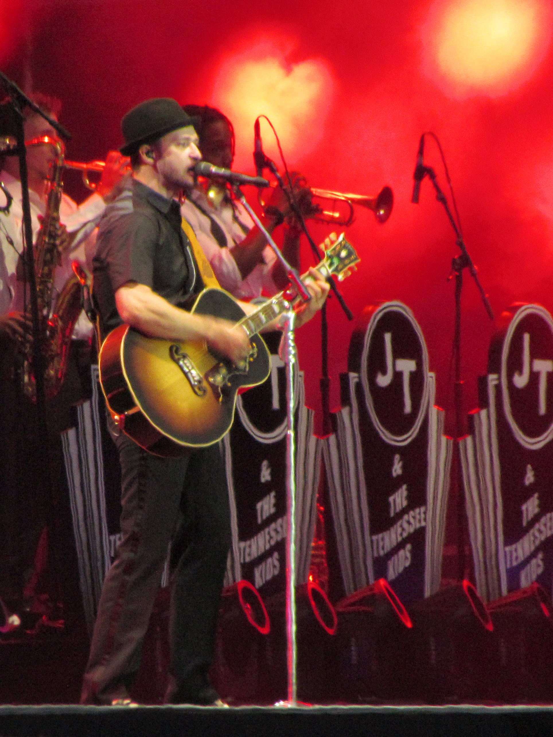 El cantante Justin Timberlake promocionando su álbum The 20/20 Experience durante el Wireless Festival en el Queen Elizabeth Olympic Park de Londres, Inglaterra. 12 de julio de 2013.